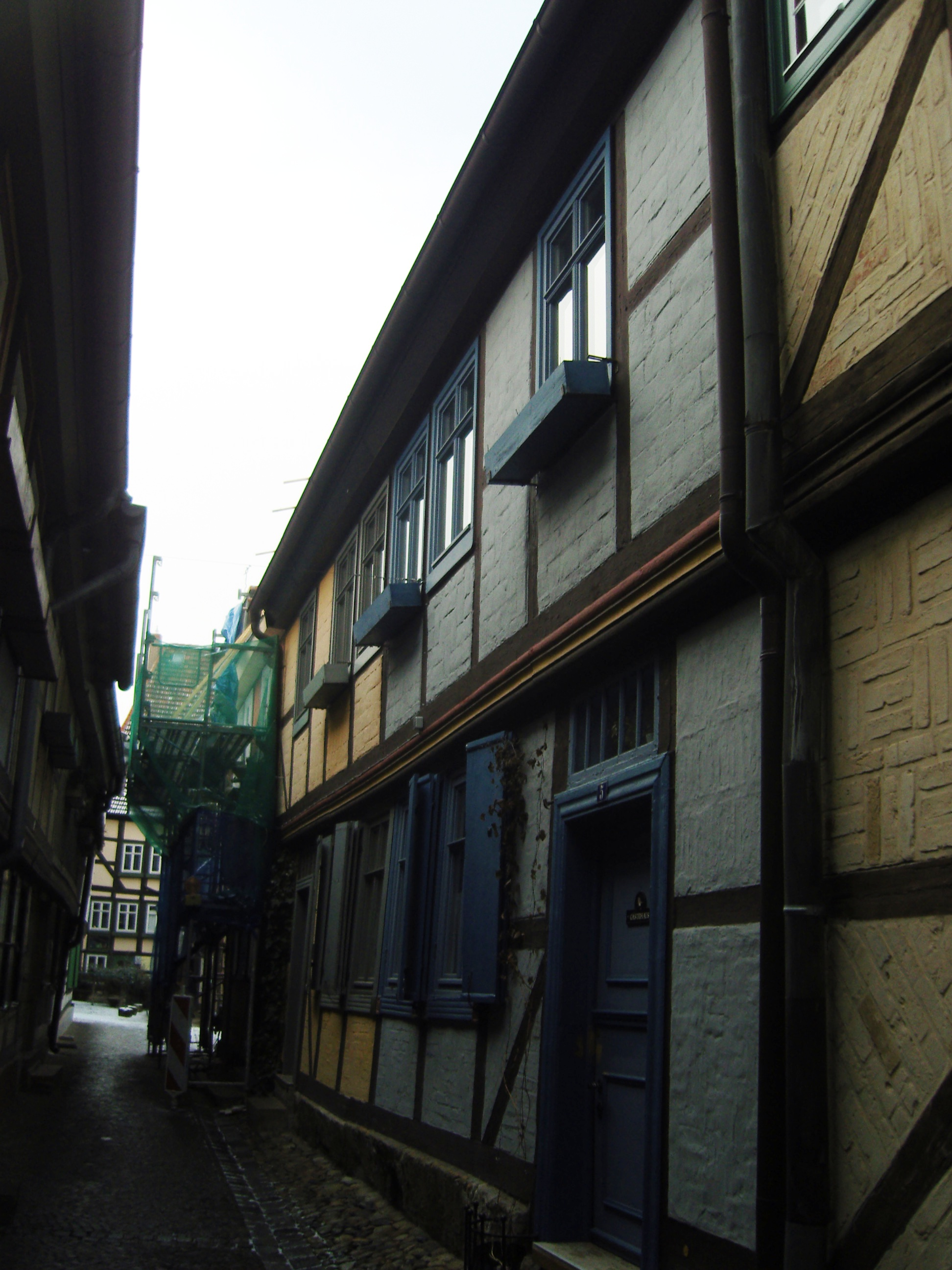 Denkmalgeschütztes Handwerkerhaus im Schuhof 5 (vorn) und Schuhof 4 (hinten) in Quedlinburg